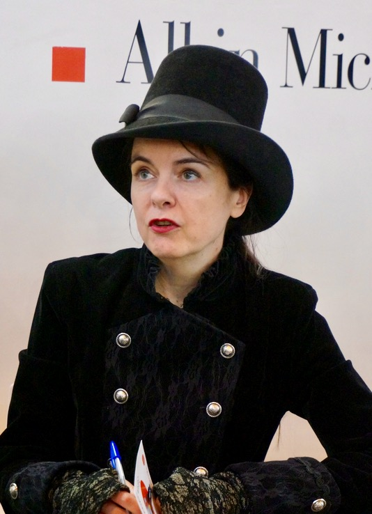 lors du salon du livre de 2015.